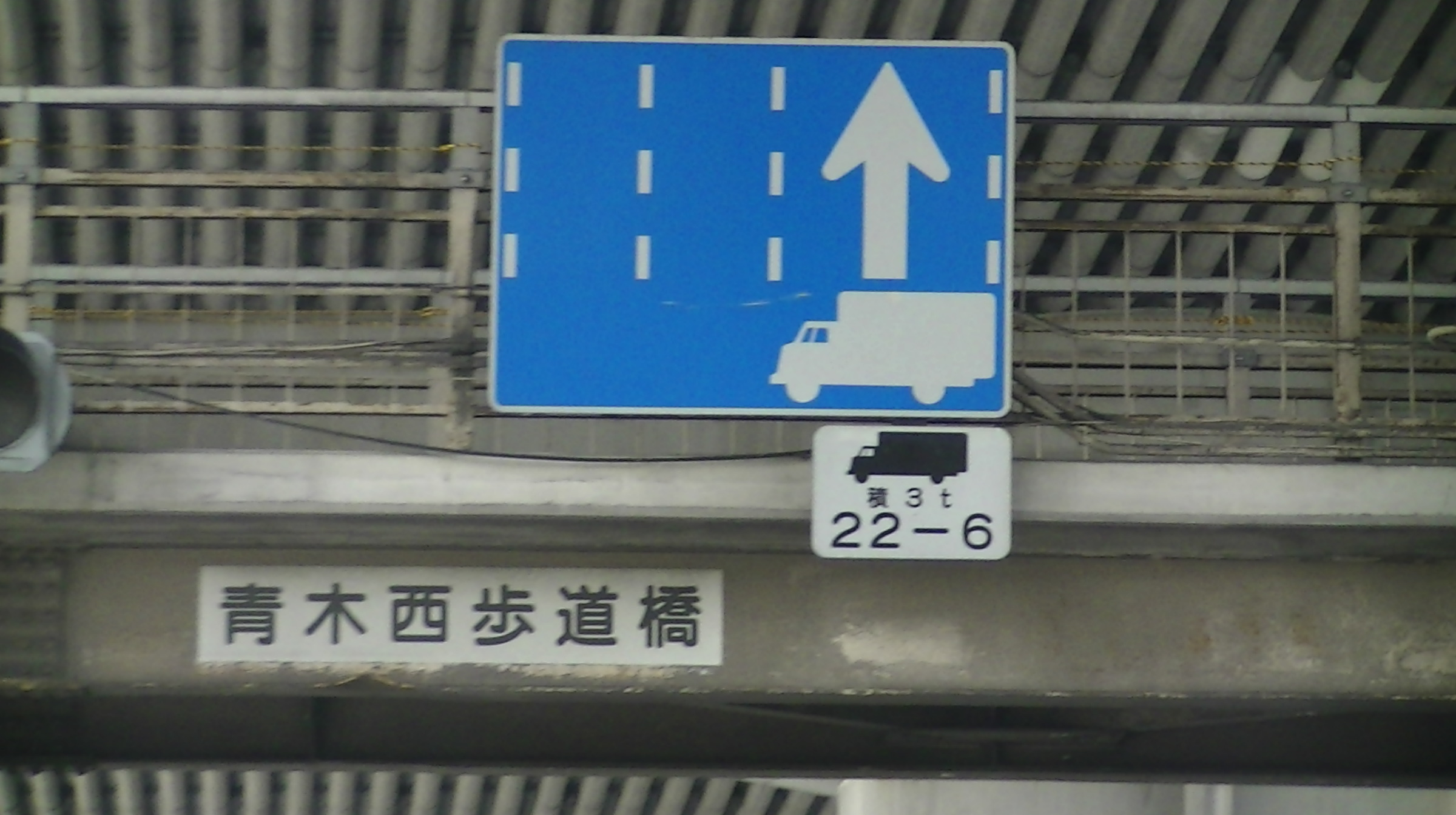 国道43号の神戸市灘区で撮影。大型車の通行規制が中央よりになっている。